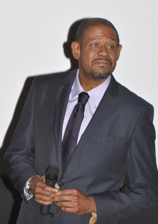 Forest Whitaker à l'avant-première du film My own love song